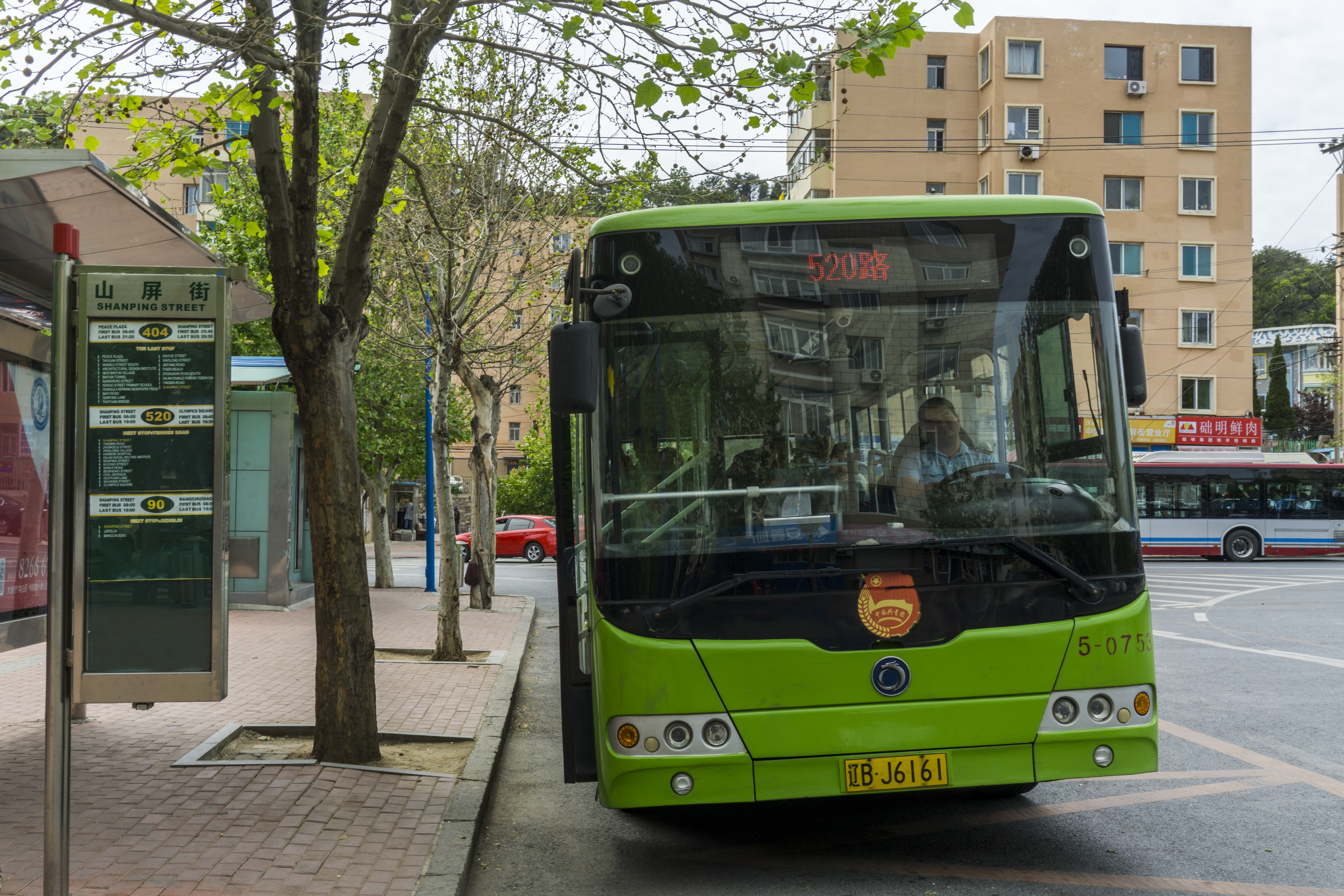 运行于大连公交520路的SLK6855UF53型柴油公交车